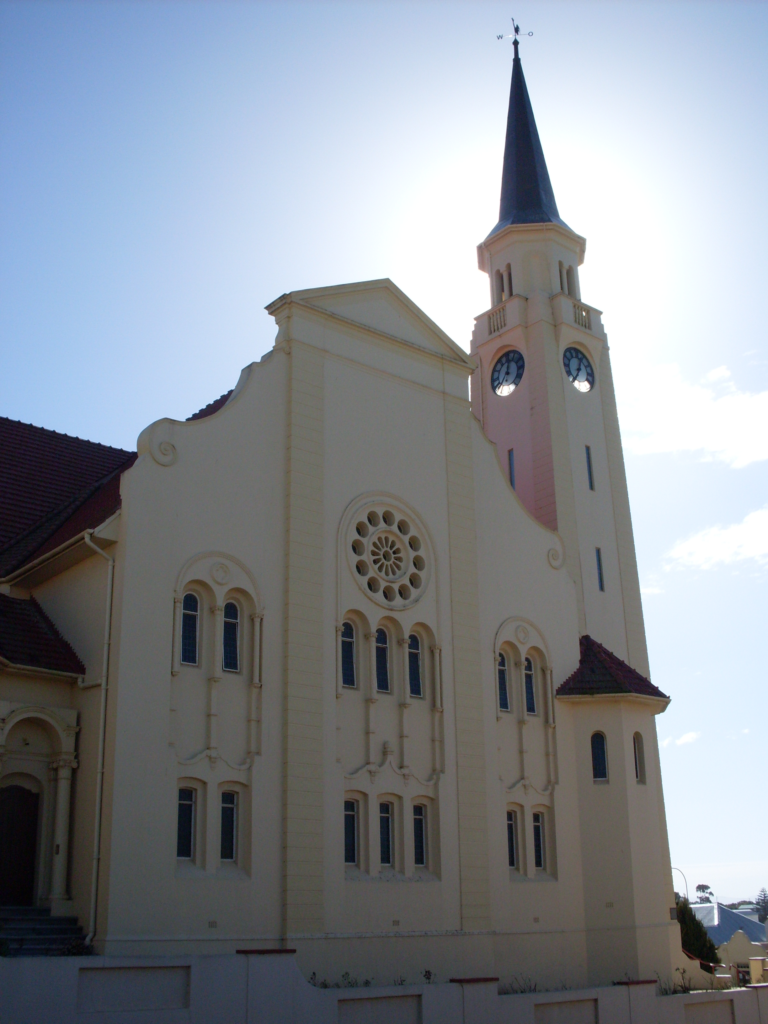 NG Kerk Napier se sykantargitektuur